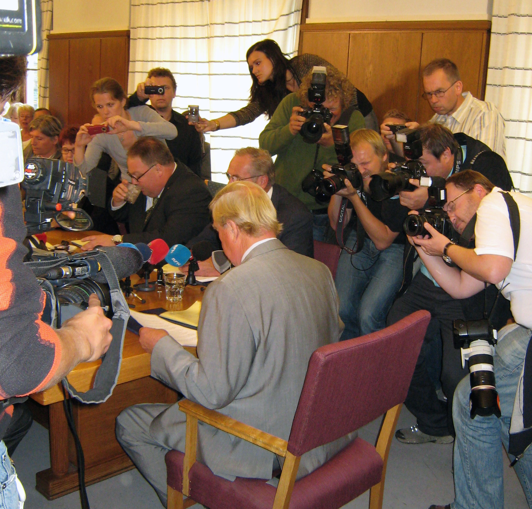 Dietlev-Simonsen i Oslo bystyres forretningsutvalg, der han redgjorde for forholdene omkring bankkontoen i den sveitsiske banken Schweizerische Kreditanstalt.